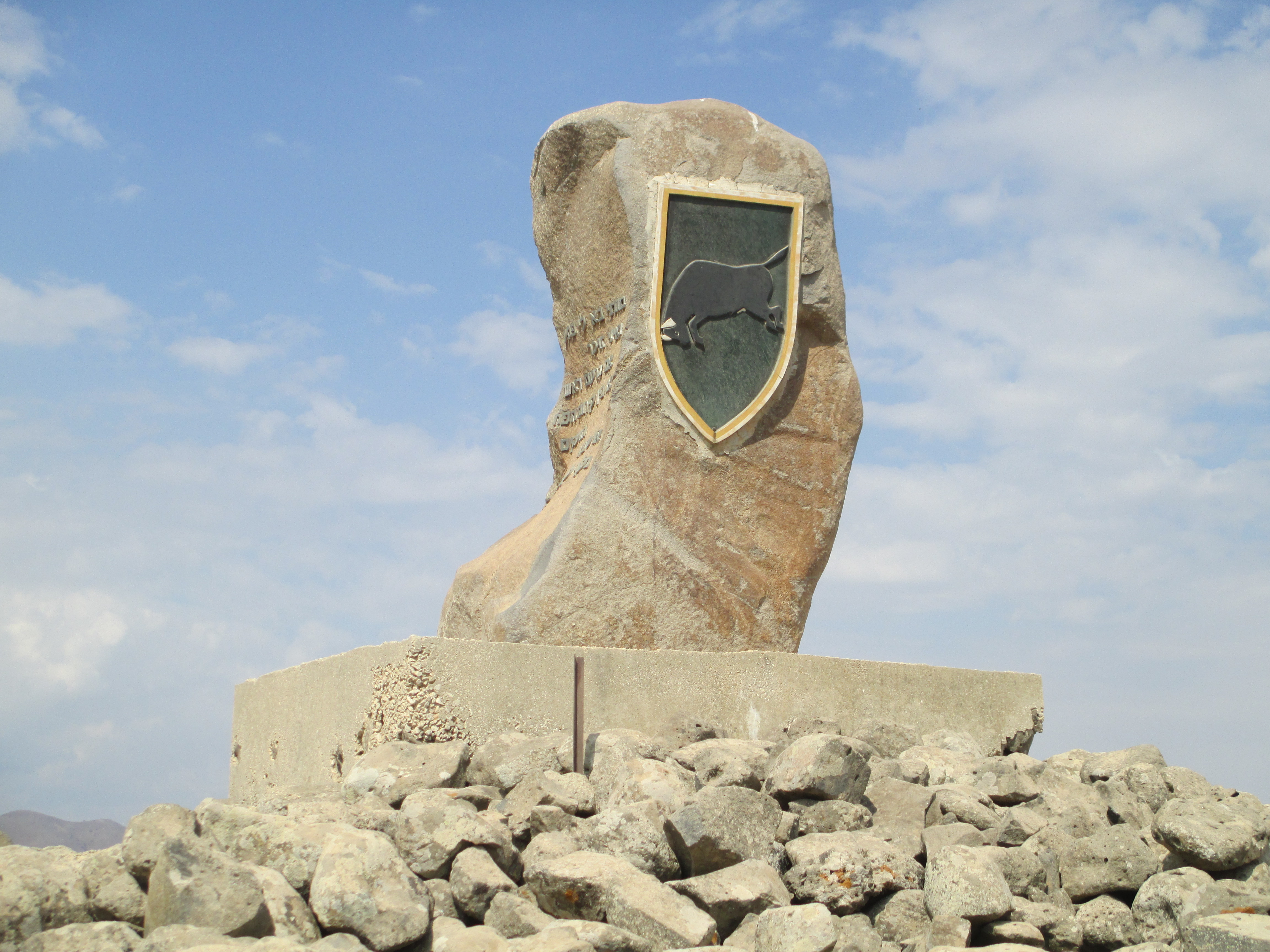 אנדרטת חטיבה 179 (כיום עוצבת ראם) בגולן